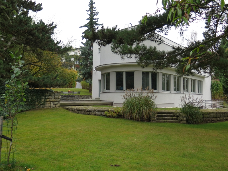 Vila Barrandovská 46, Barrandovská 180/46, Barrandov.